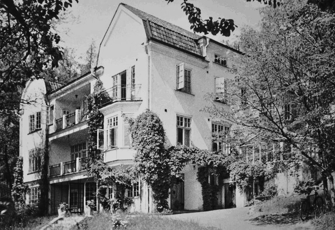 Villa Strandvik, Gustavsberg